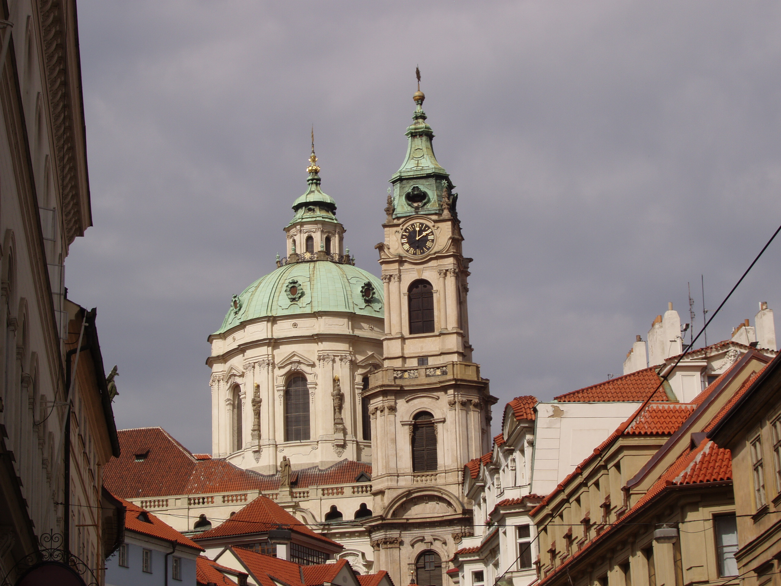 St. Nicholas (svaté mikulaš)